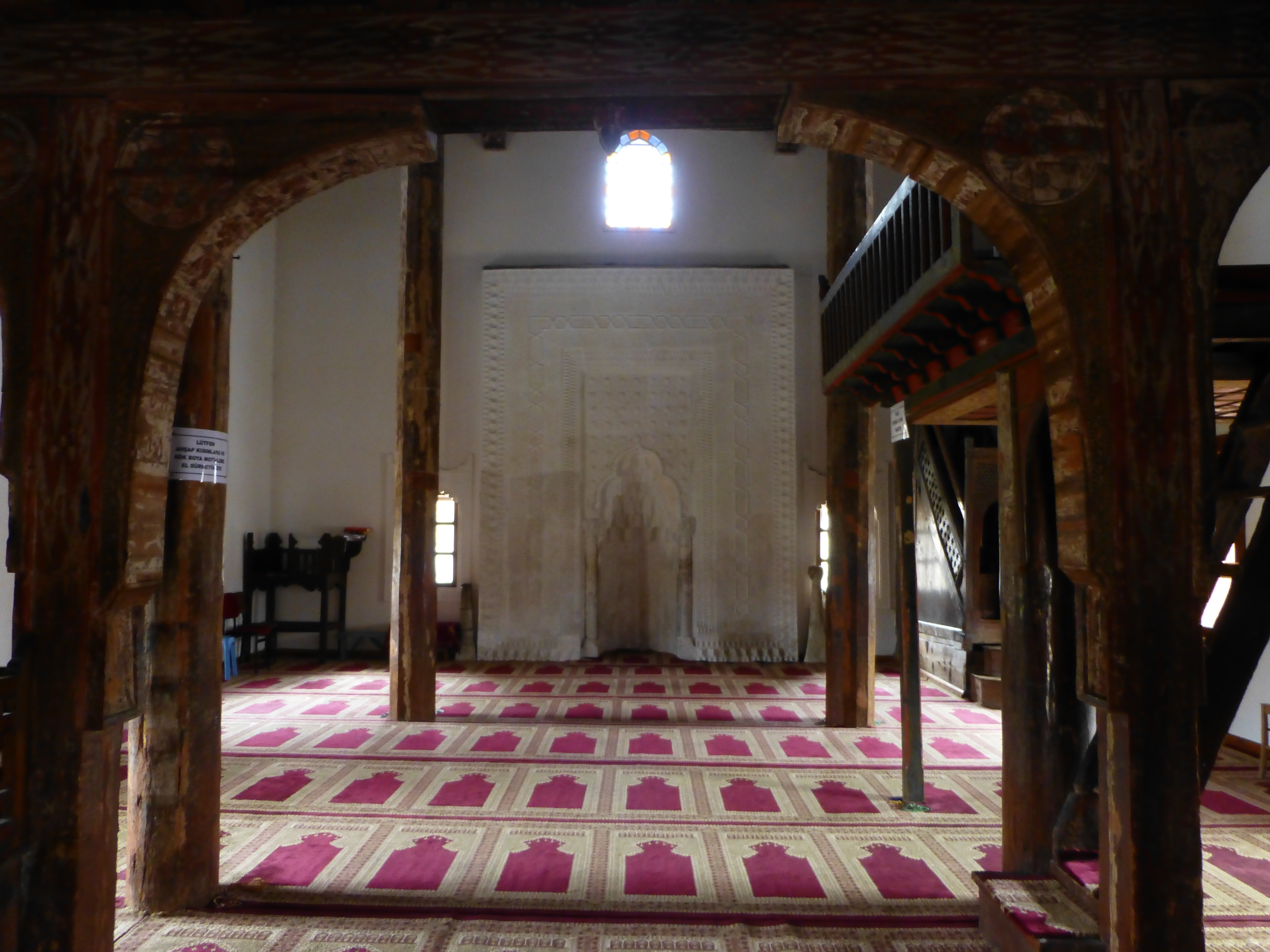 Kastamonu Kasaba köyü, Mahmutbey Camii, Çivisiz camii